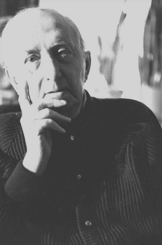 Walter Molino, illustratore delle copertine della Domenica del Corriere e Grand Hôtel. Ritratto fotografico di Joe Zattere (fumetti d'Italia)